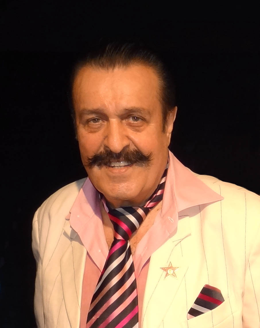 Вилли Токарев. Сочи, Зелёный театр. 01. 07. 2012 Ви́лли То́карев (Виле́н Ива́нович То́карев; 11 ноября 1934, хутор Чернышёв, Шовгеновский район, Адыгейская автономная область, Северо-Кавказский край) — советский, американский и российский певец, поэт и автор-исполнитель.